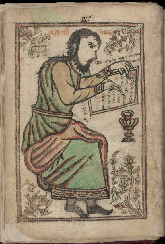 Autoportrét popa Punčo v jeho sborníku kázání z roku 1796, fol. 7(v).